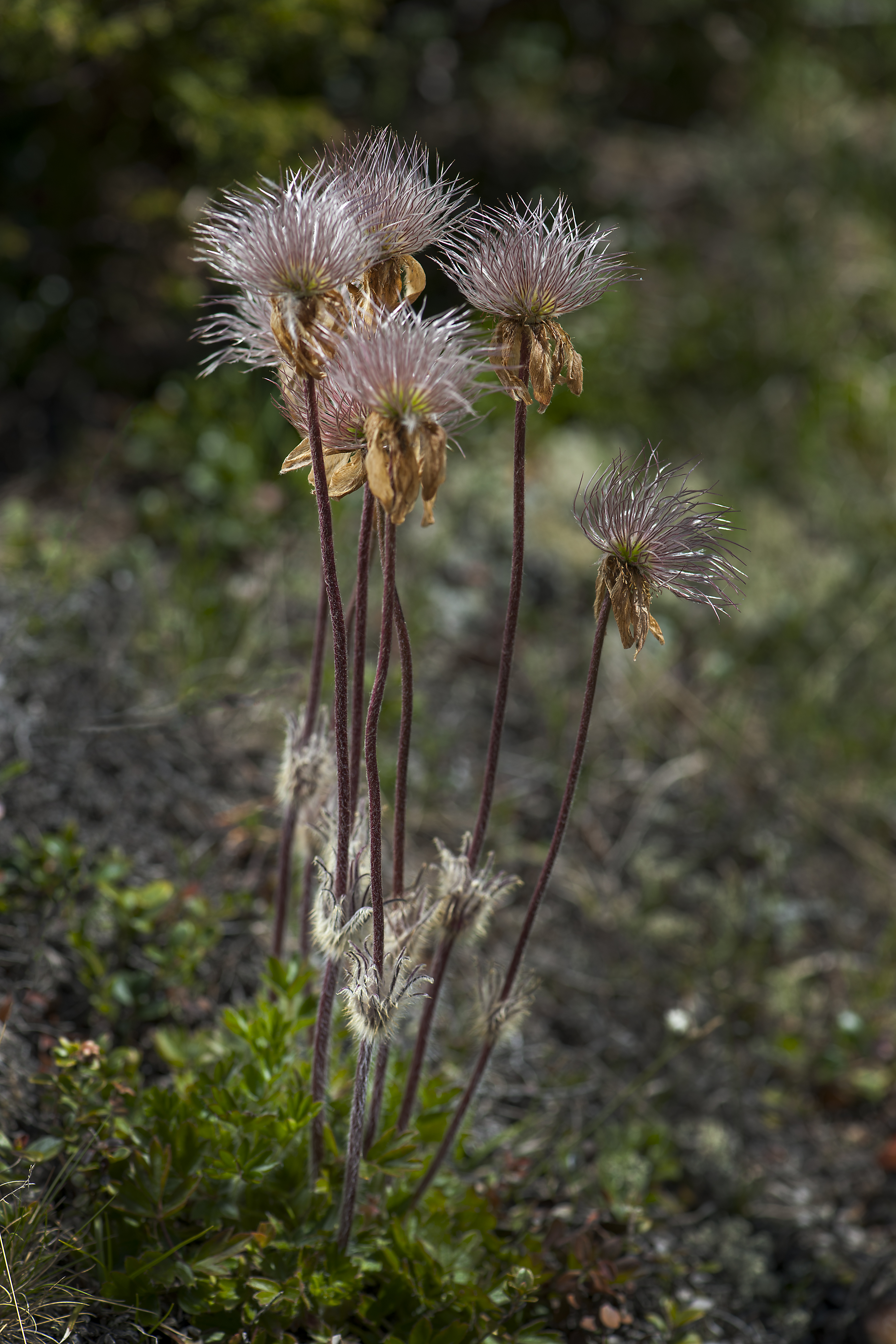 Mogop Pulsatilla vernalis blomstrer ofte tredje uka i mai, så når fjellhagen åpner i juni har den allerede nådd frøstadiet. Spring Pasqueflower Pulsatilla vernalis flowers early in the alpine garden. When the garden opens in June its seeds are starting to ripen. Foto: Åge Hojem / NTNU Vitenskapsmuseet Photo: Åge Hojem / NTNU University Museum